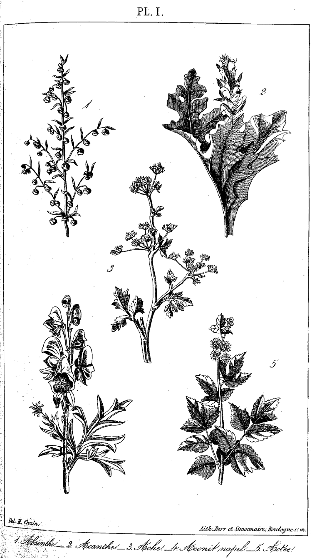 François-Joseph Cazin et Henri Cazin, Traité pratique et raisonné des plantes médicinales indigènes : avec un atlas de 200 planches lithographiées, Paris, P. Asselin, 1868. Planche I ː absinthe, acanthe, ache, aconit, actée.